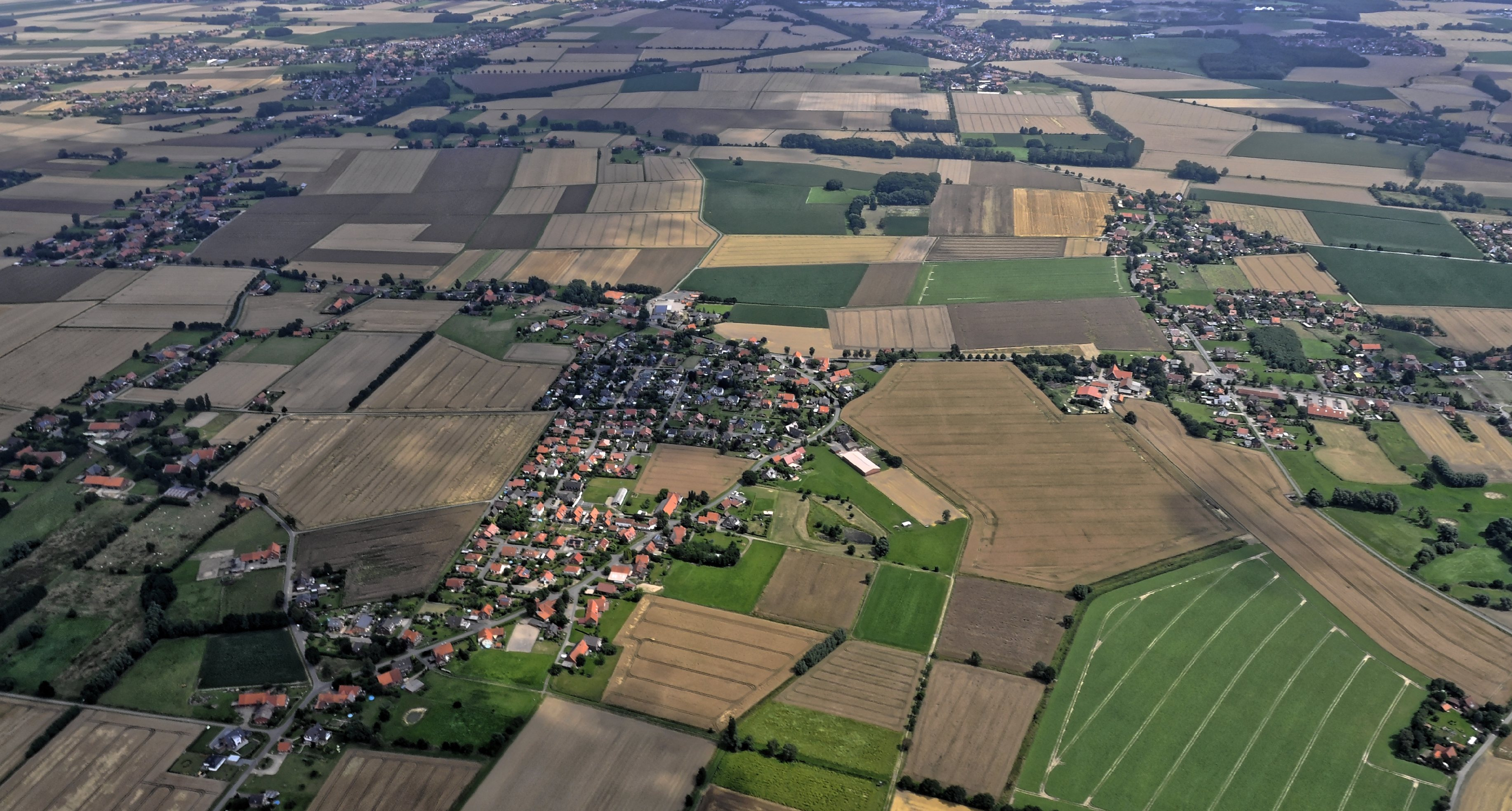 Bilder vom Flug Nordholz-Hammelburg 2015: Blick von Westen auf Hespe; rechts Levensen; links hinten Meerbeck.